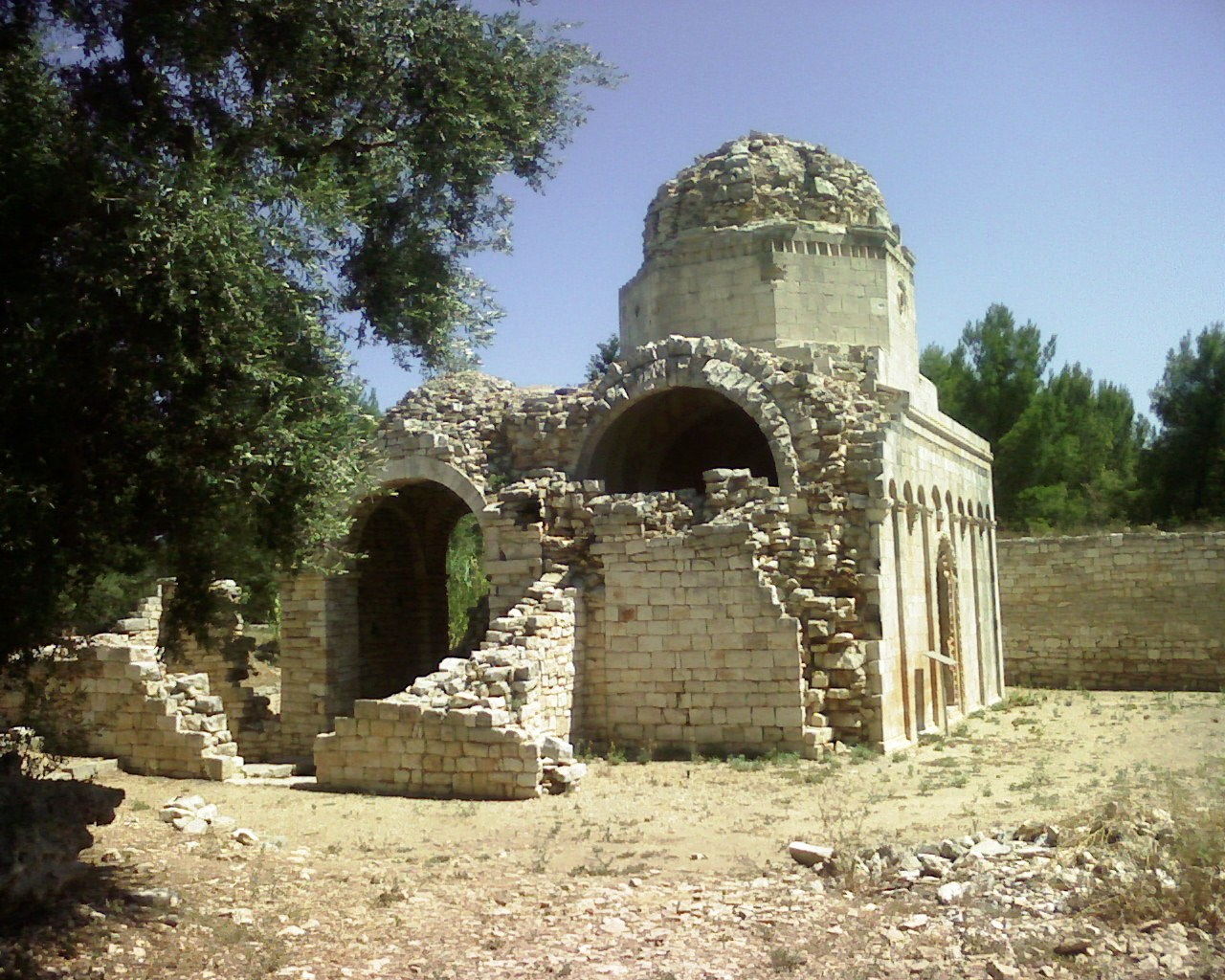 chiesa di san felice in balsignano - Modugno (bari)-Italy